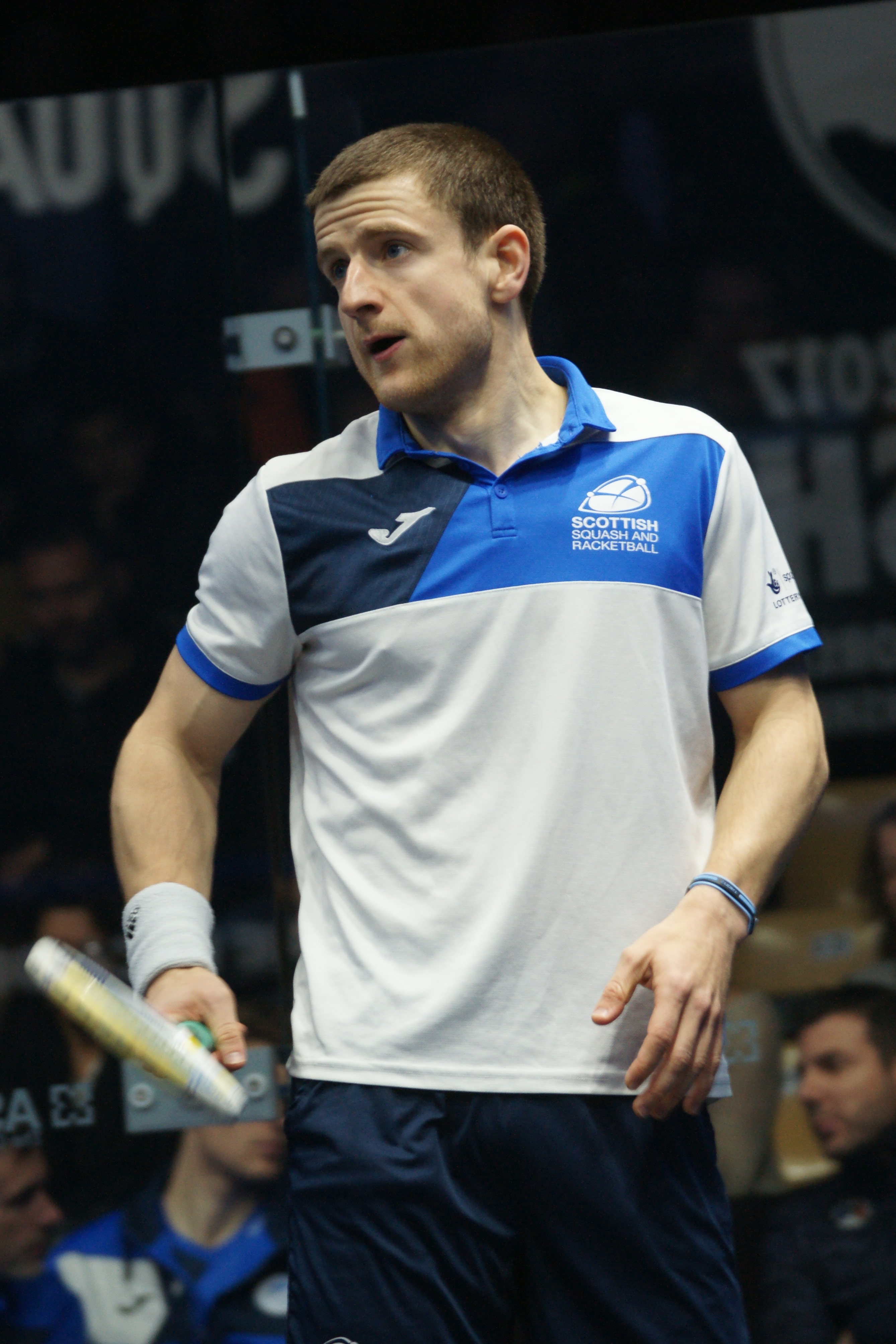 Alan Clyne, championnats du monde de squash par équipe Marseille 2017